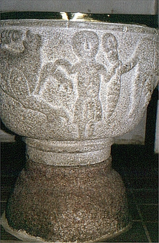 Svostrup Kirke, døbefont